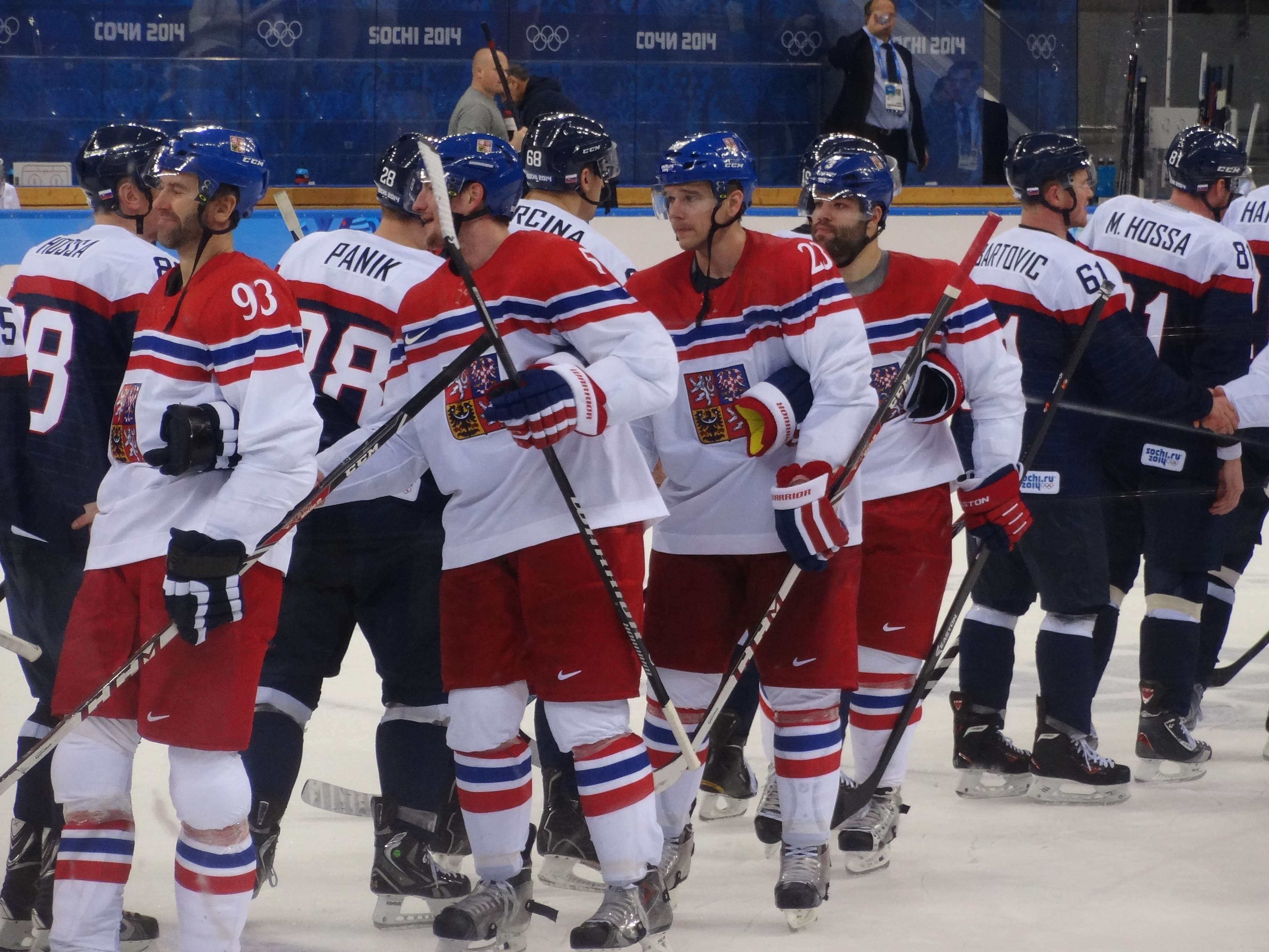 18 февраля 2014 года, Ледовая Арена "Шайба". Чехия - Словакия 5:3 (3:0, 1:1, 1:2)